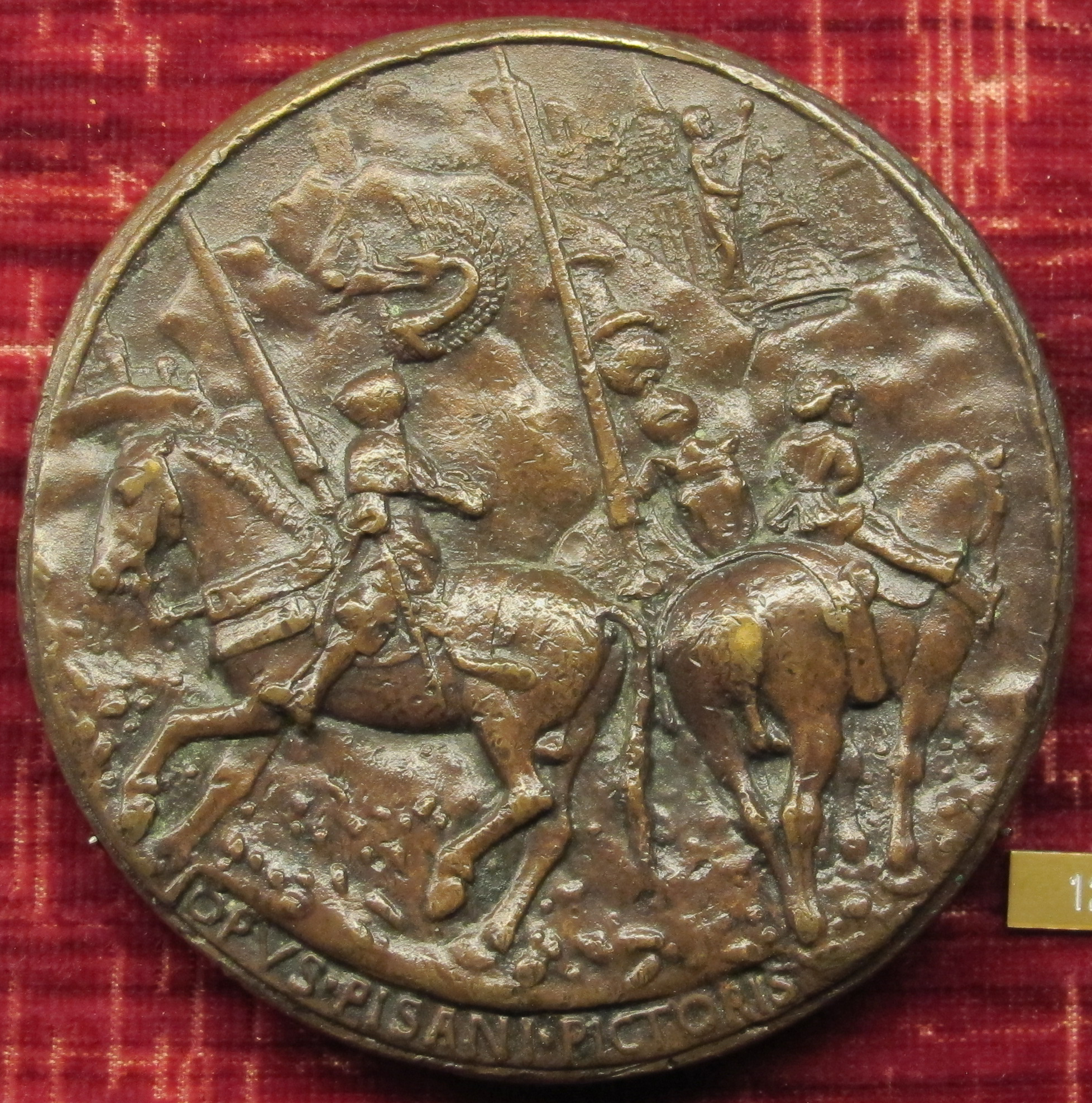 Pisanello, Medaglia di Filippo Maria Visconti, verso